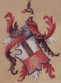 Stemma dei Magnani